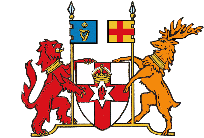 Es el escudo de Irlanda del Norte, el oficial.